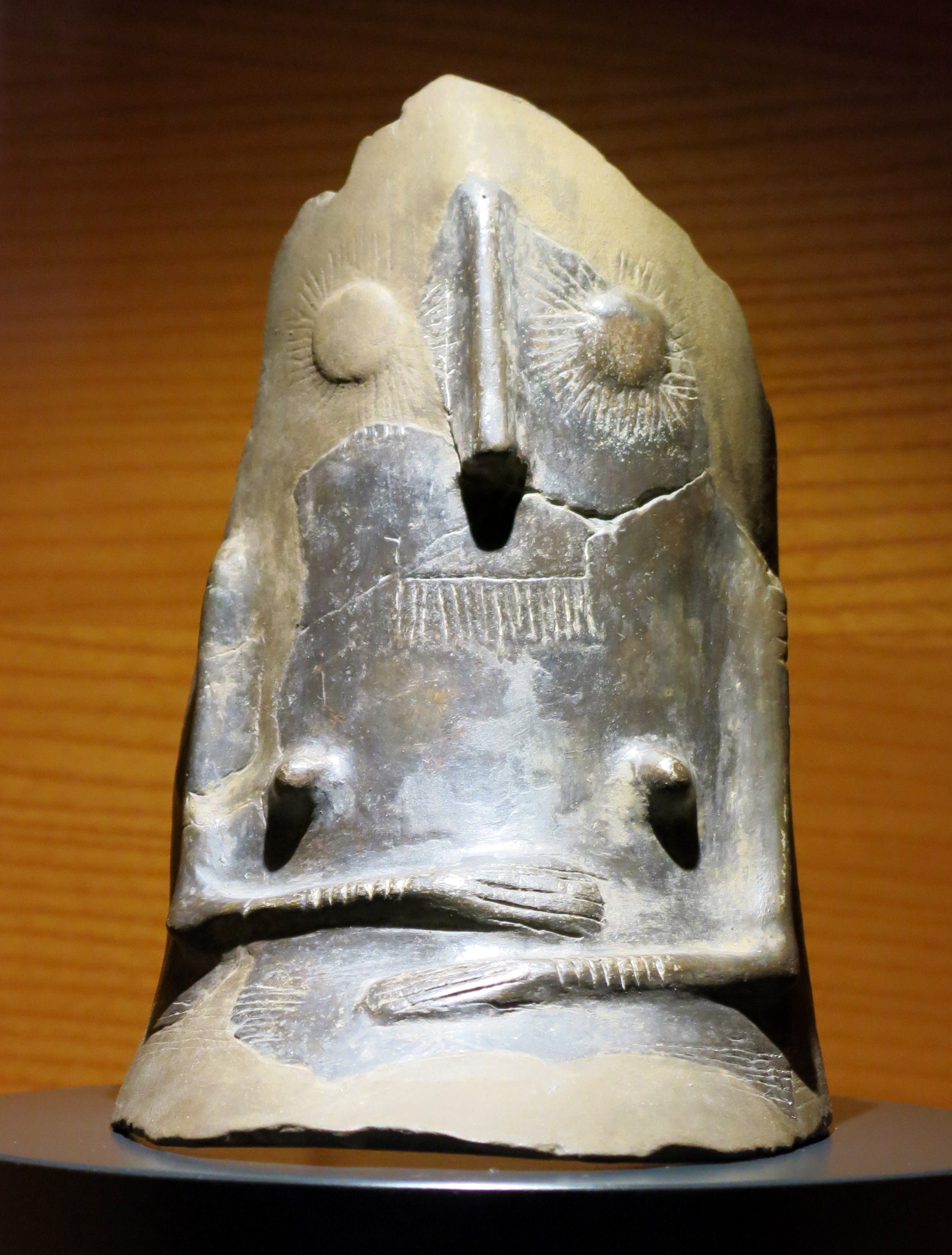 Venus de Gavà, al museu municipal de Can Lluch